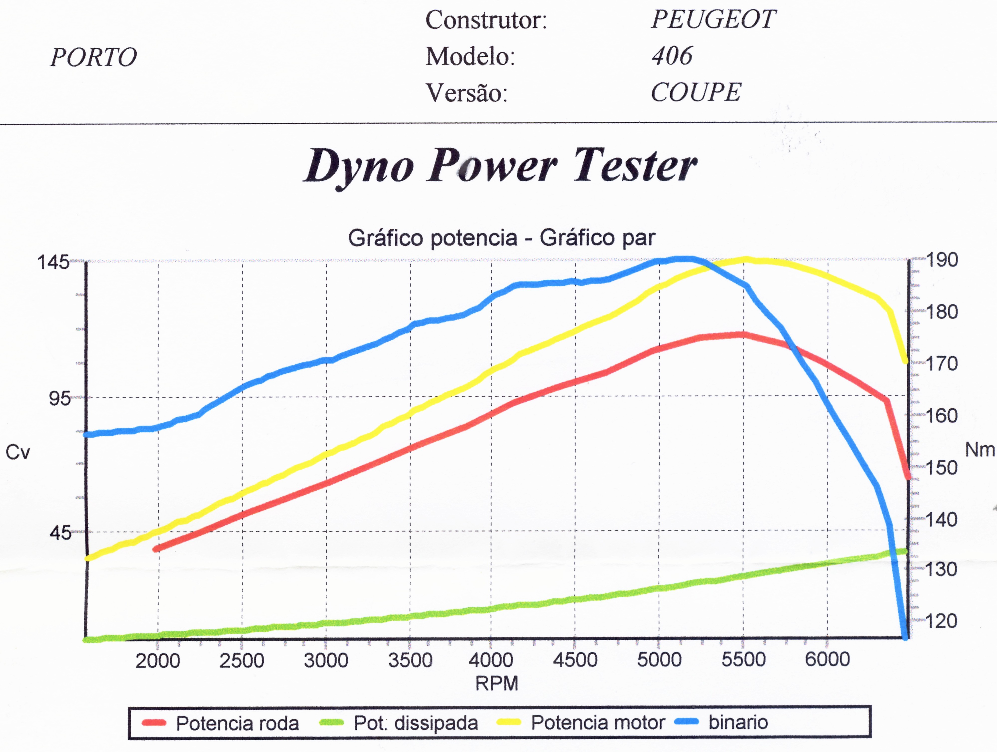 Curva de binário e potência de um motor a gasolina(torque and power curve-Peugeot 406-Coupé)